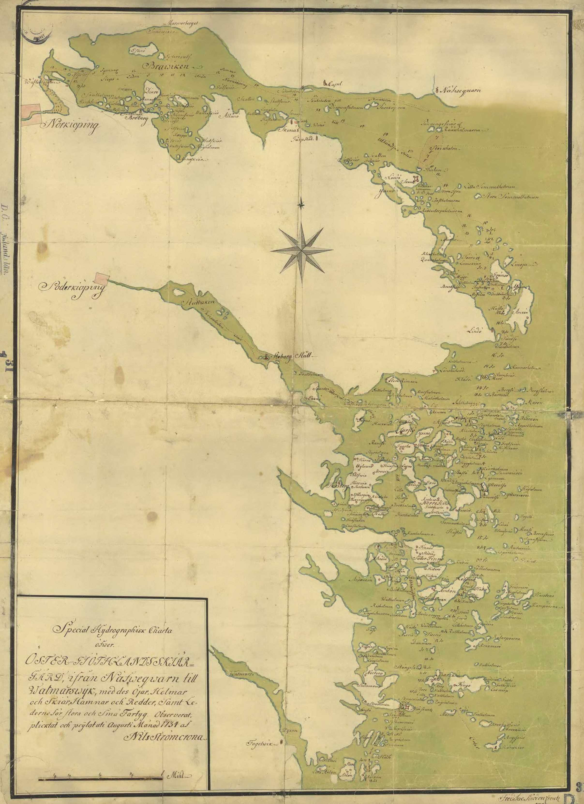 Gammal karta över Östergötlands (med bland annat St. Annas) skärgård från Valdemarsvik till Brånviken.